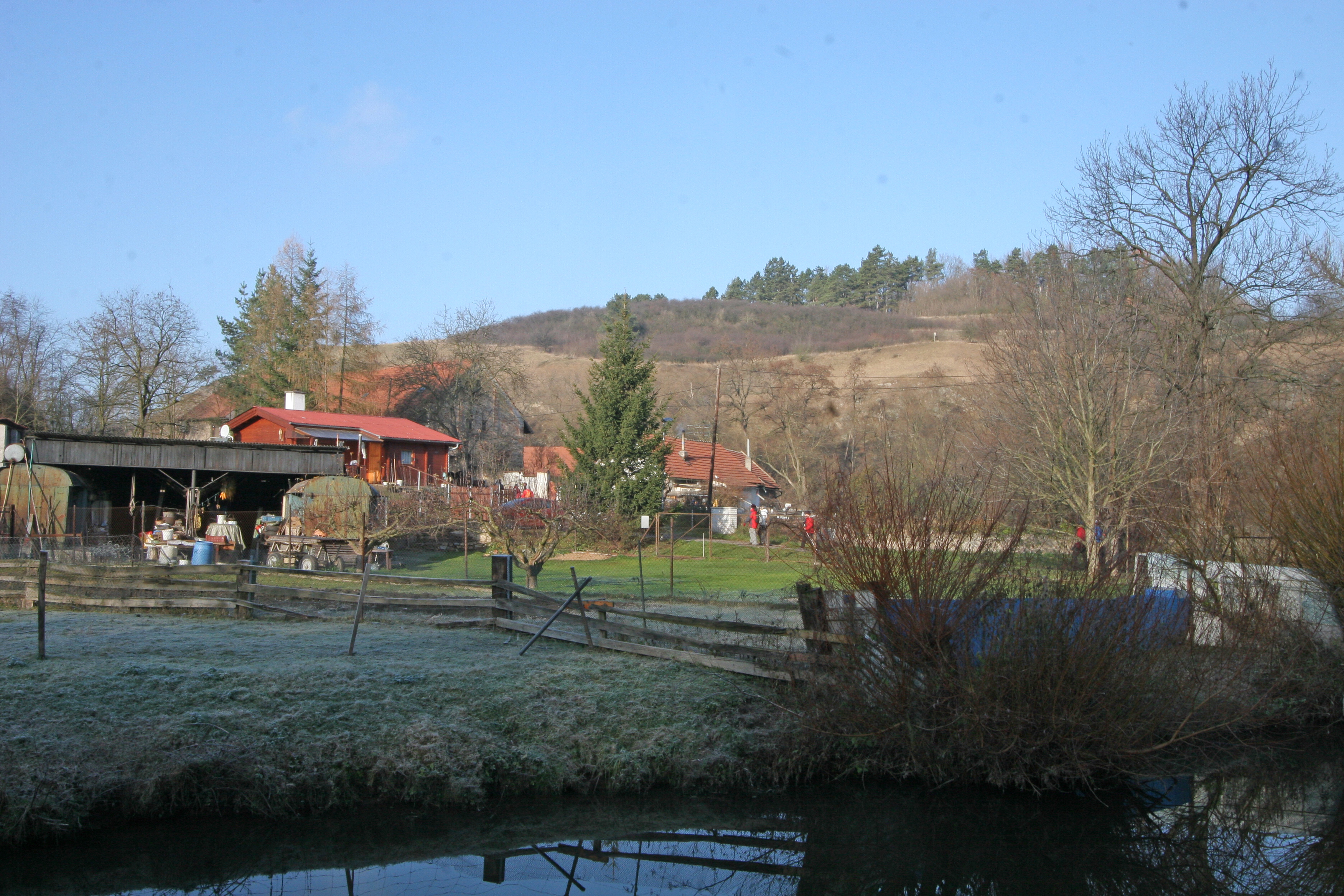 Chroustov u mostu